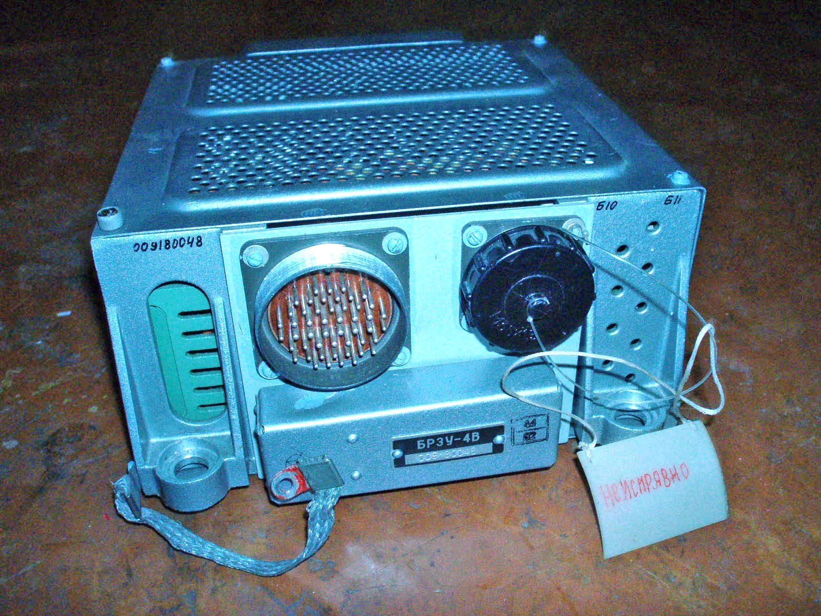 Блок БРЗУ-4В